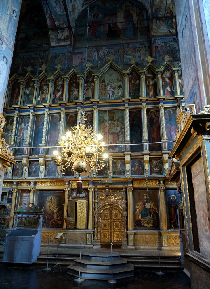 Собор Благовещенский (Архангельская область, Сольвычегодск, Музейный переулок)